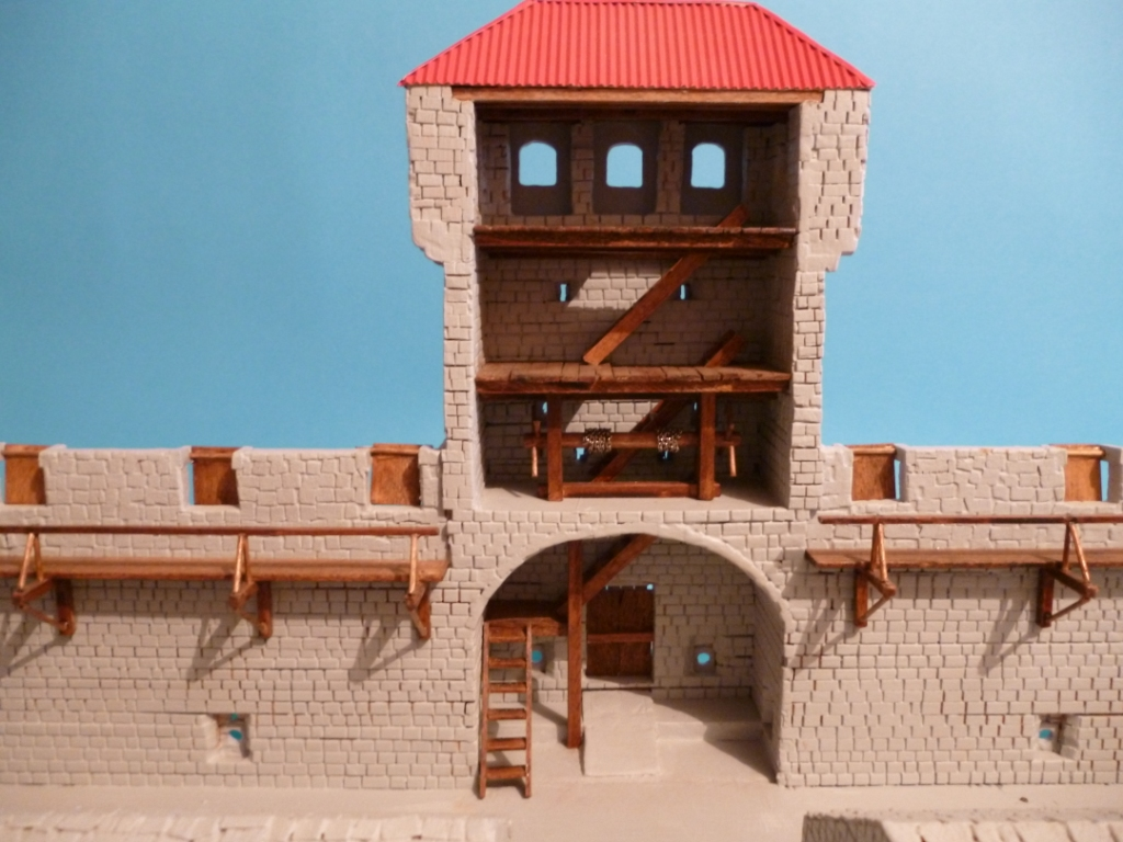 opatičin kaštel-Kaštel Gomilica- maketa ulazna kula